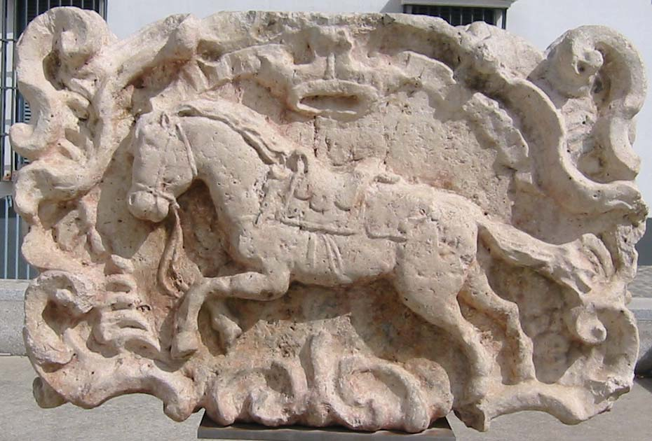 Escudo de Morón de la Frontera (Sevilla) del siglo XVIII situado en la Plaza del Polvorón